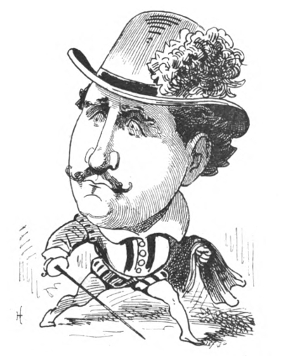 Portrait satirique de Henri Lafontaine (1824– 1898), acteur vaudois.